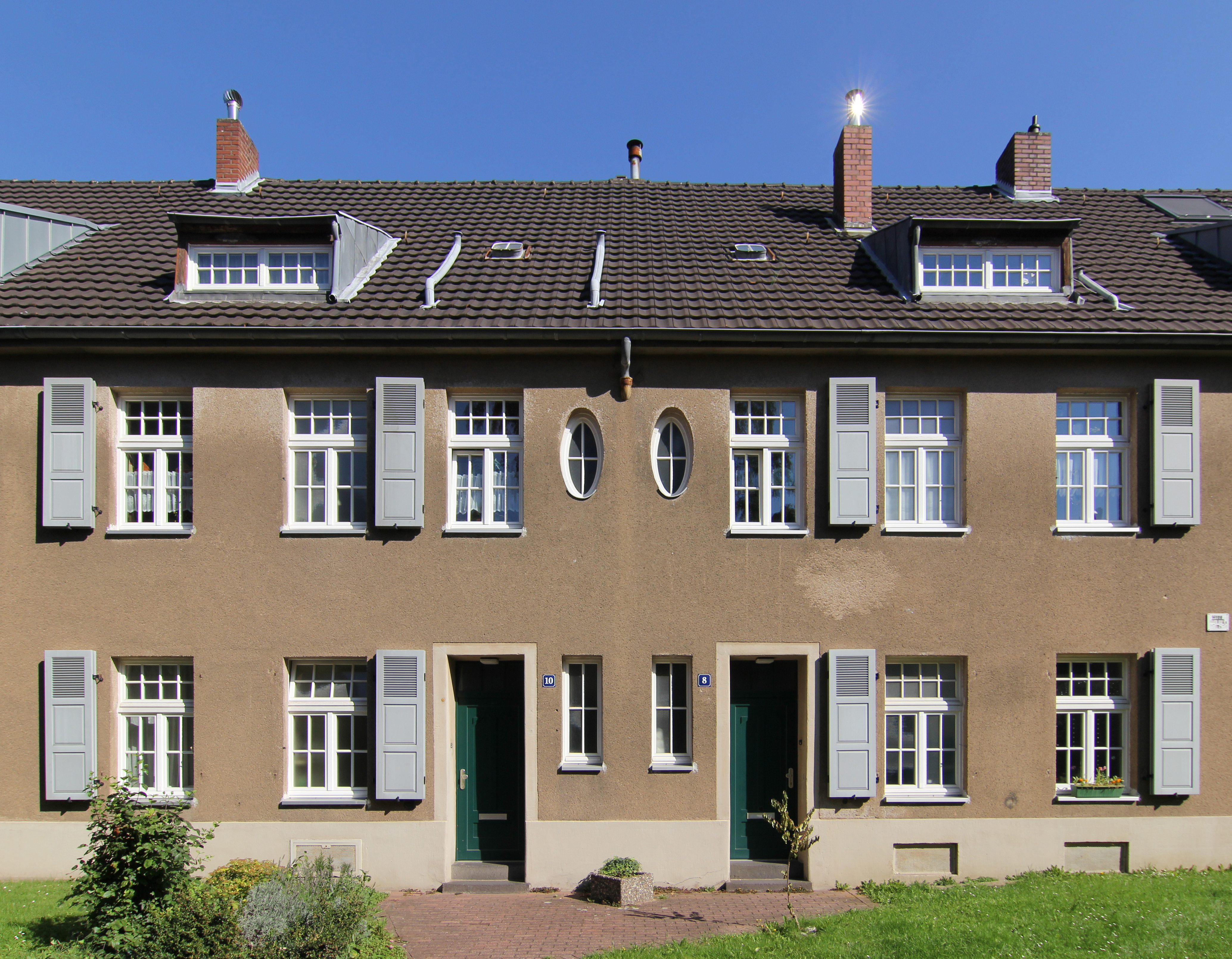 Lansstraße 8, 10 in Köln-Neuehrenfeld. This is a photograph of an architectural monument.